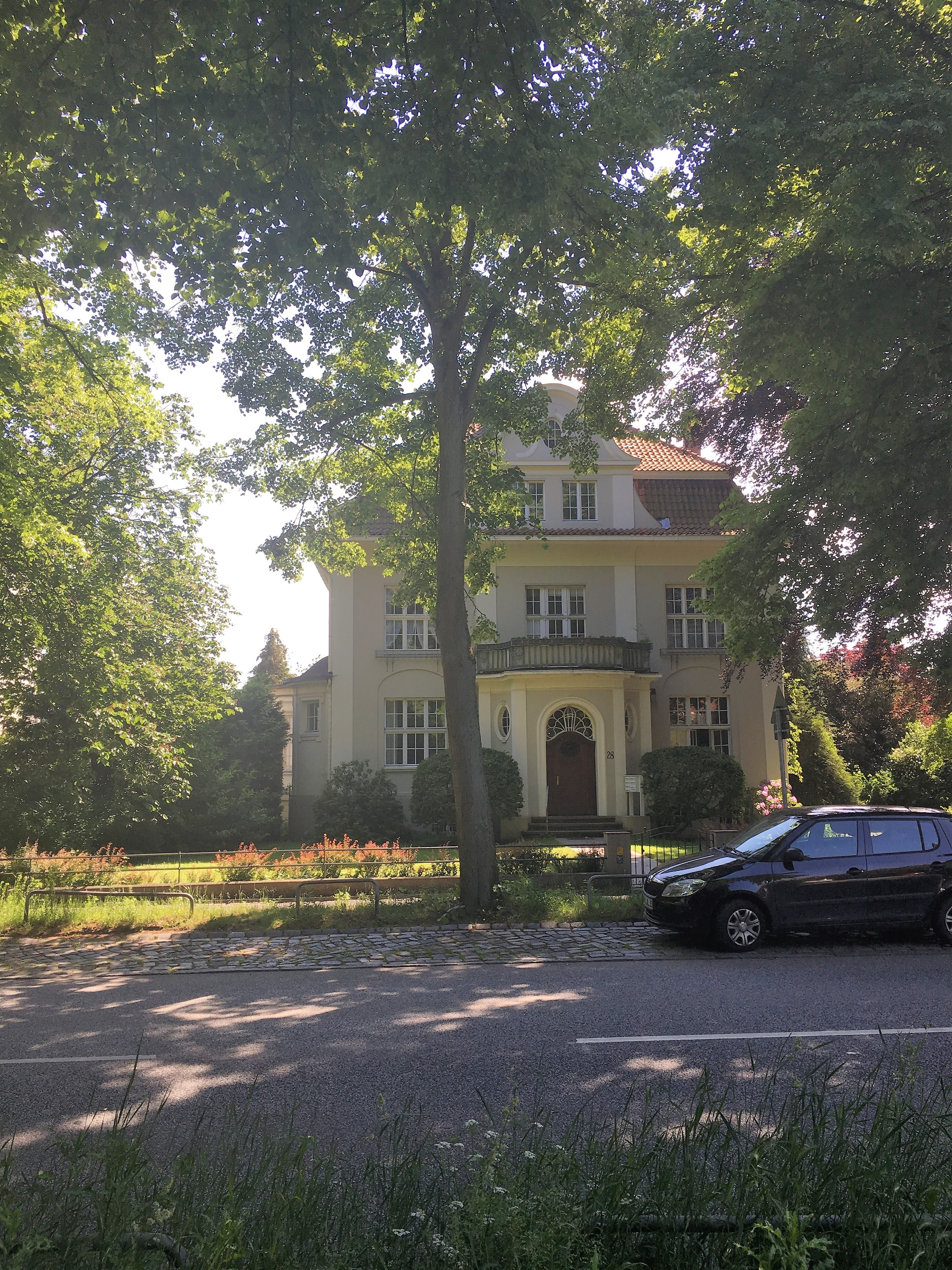 Haus Roeckstr. 28 in Lübeck.